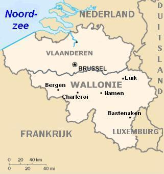 kaart Wallonië. Eigen bewerking van de kaart: Afbeelding:Belgie.png Willem 11 jul 2004 21:07 (CEST)